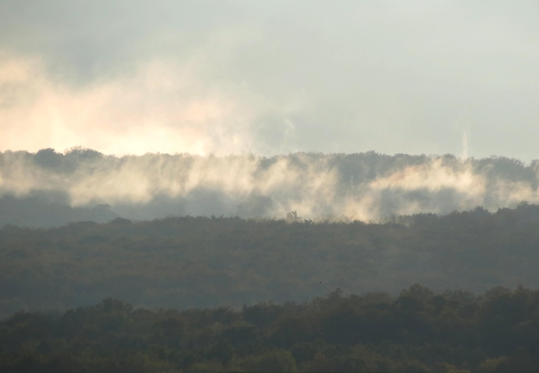 Hainich: Nebel steigen aus dem Seebachgrund bei Oberdorla auf.